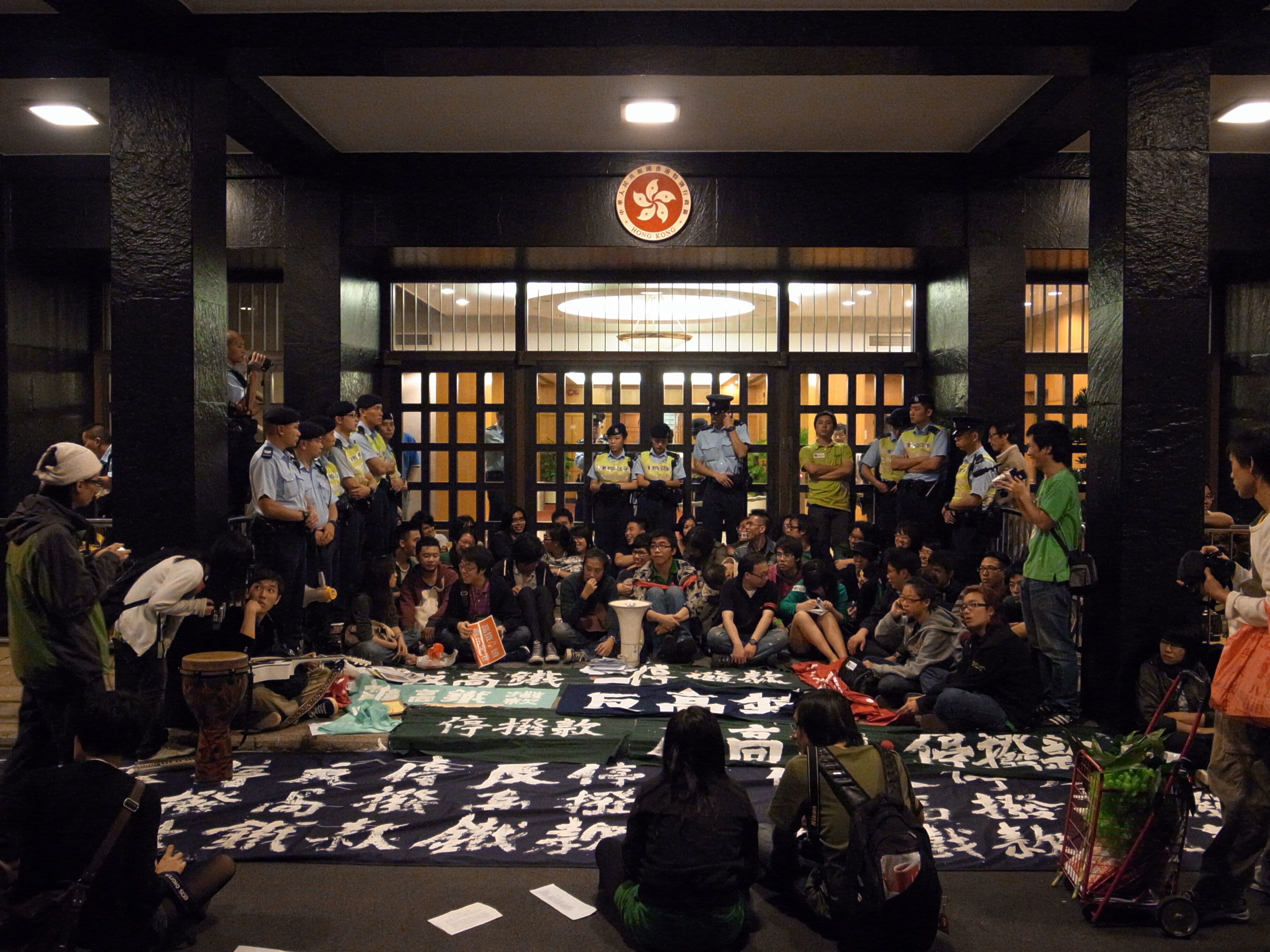 反高鐵政府總部靜坐 (2009年12月1日)